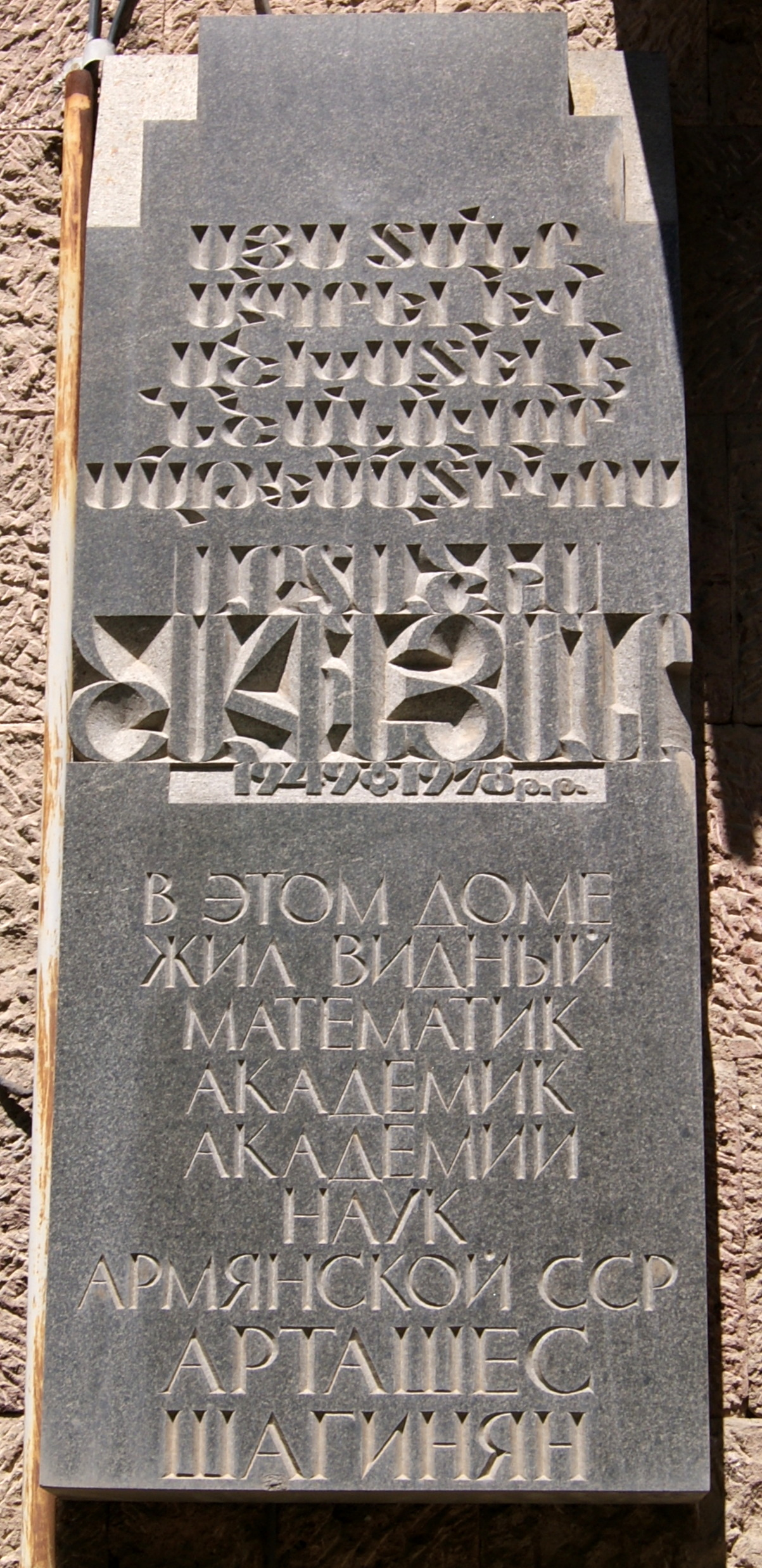 Artashes Shahinyan's plaque on Baghramyan avenue